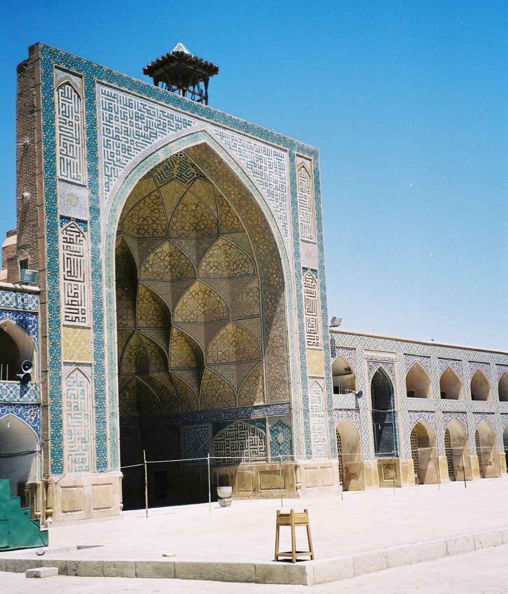 Iwan de la mosquée dite du vendredi à Ispanhan (Iran)